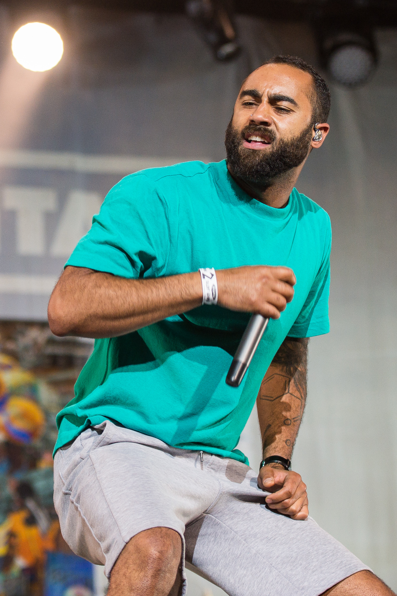 ARGO-Konzerte,Beck's Park Stage,Festival,Konzert,Livekonzert,Livemusik,Musik,RiP,Rock im Park 2016,Rudimental